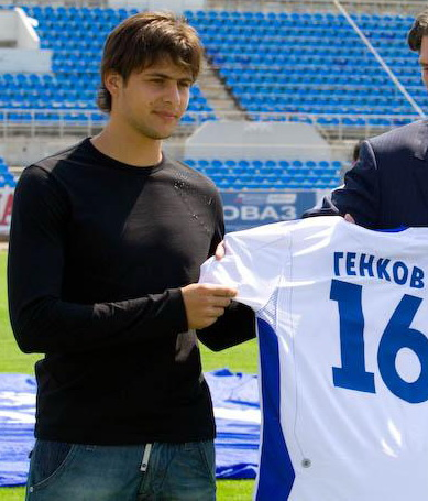 Tsvetan Genkov